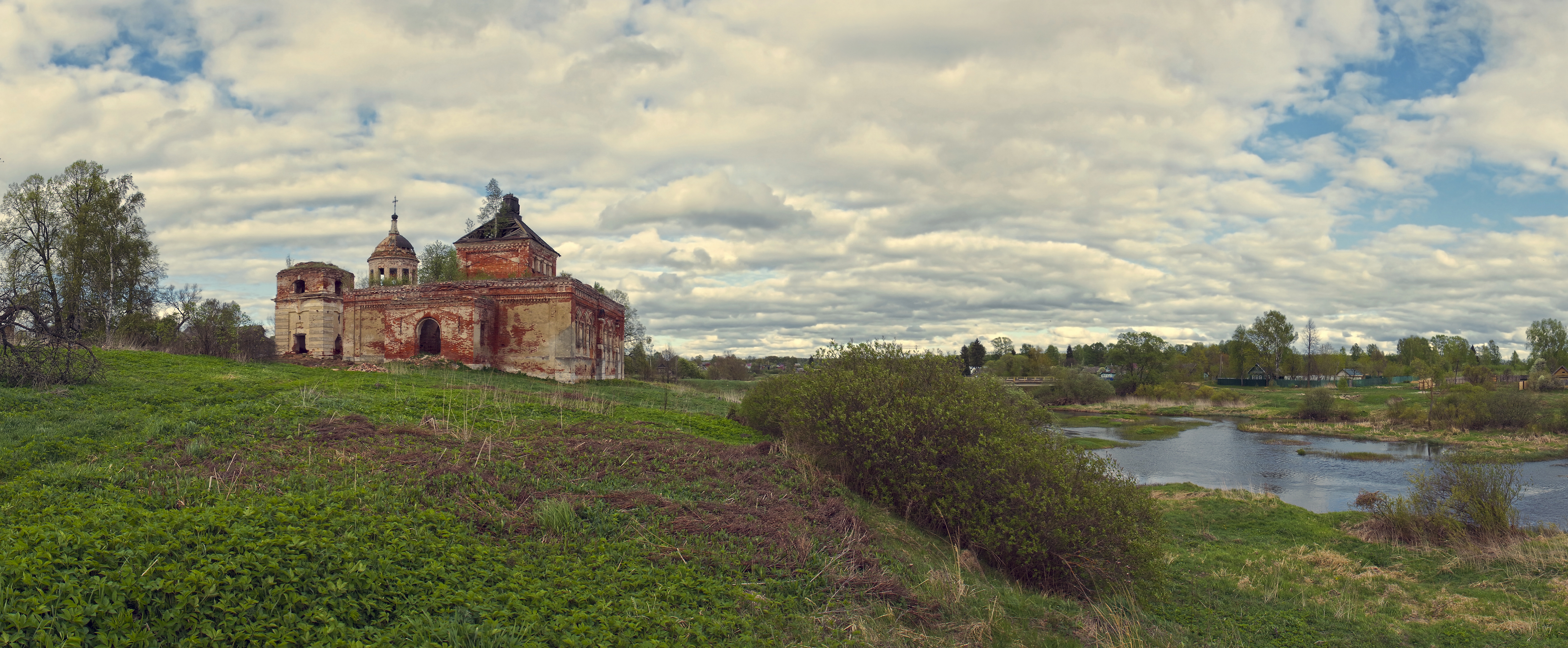 Храмовый комплекс: Кунгалово, Торжокский район, Тверская область